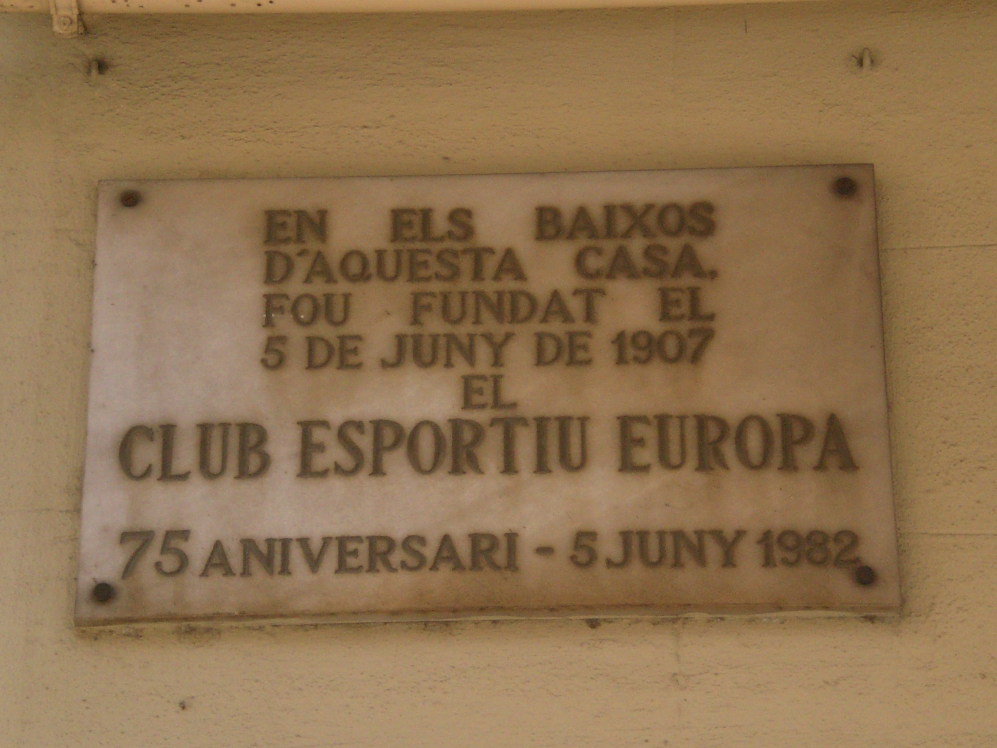 Club Esportiu Europa. C. Sicília, 290 (Barcelona)